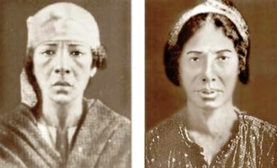 ריאה וסקינה היו שתי רוצחות סדרתיות ידועות לשמצה שפעלו במצרים בתחילת שנות ה-20 של המאה ה-20